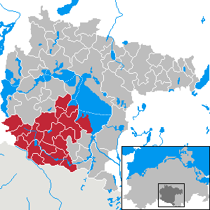 Amt Röbel-Land in Mecklenburg-Western Pomerania - District Müritz